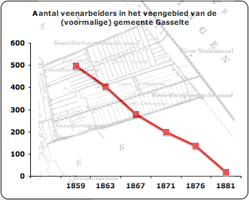 Veenarbeiders tijdens de veenafgravingen in Gasselternijveen e.o. van 1859 ot 1881